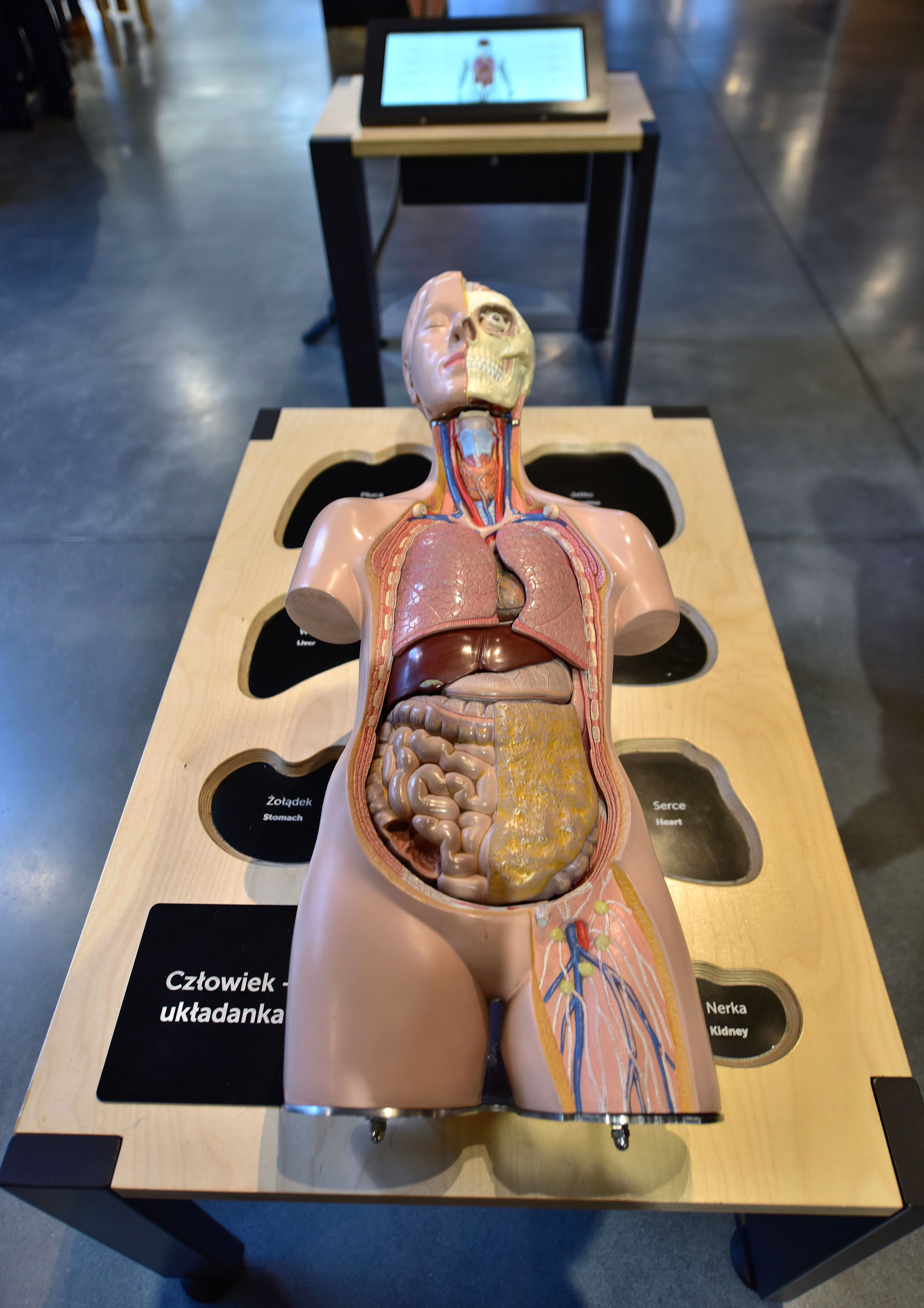 Centrum Nauki Kopernik w Warszawie